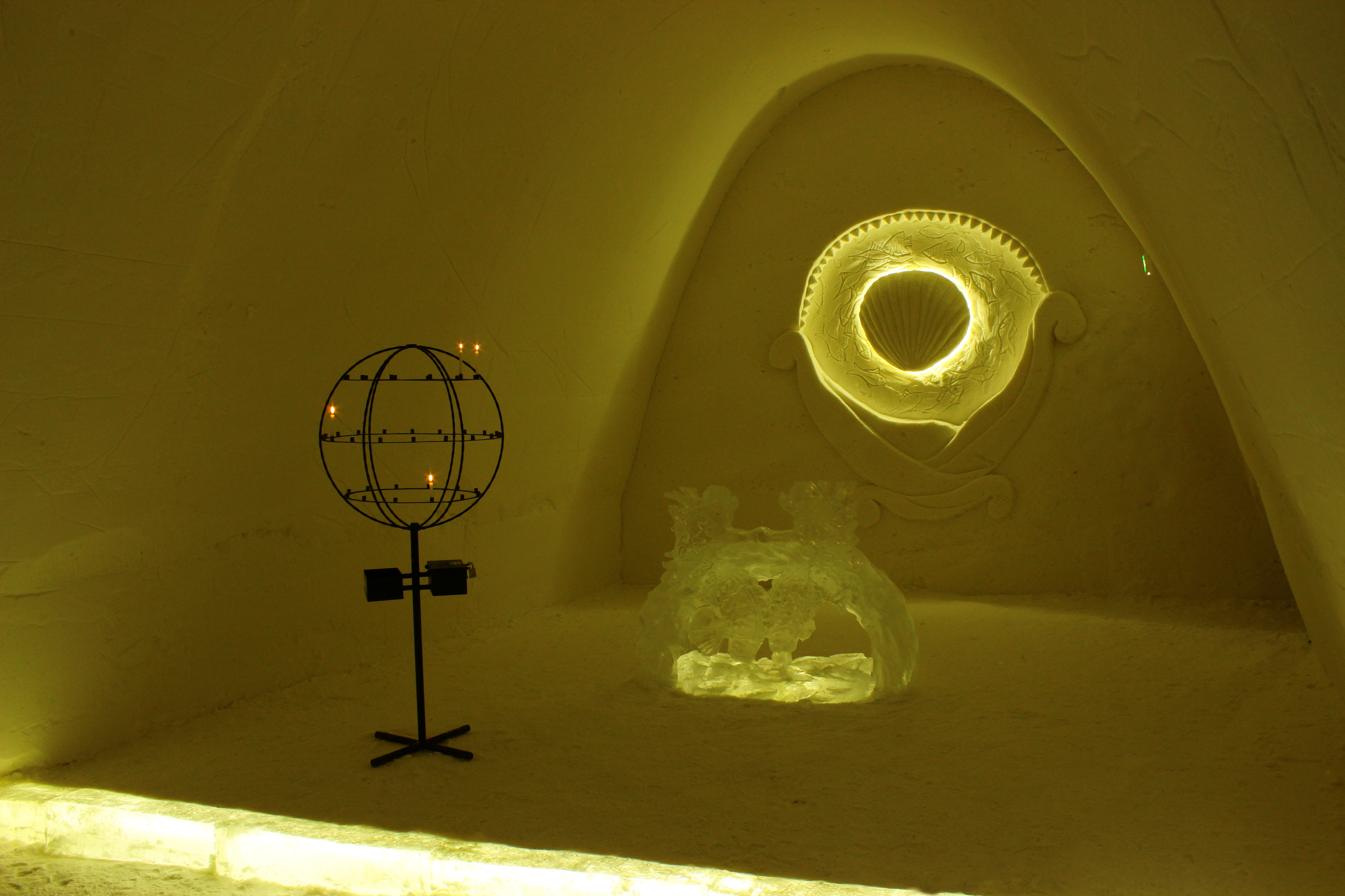 lumilinnan kappeli 2014